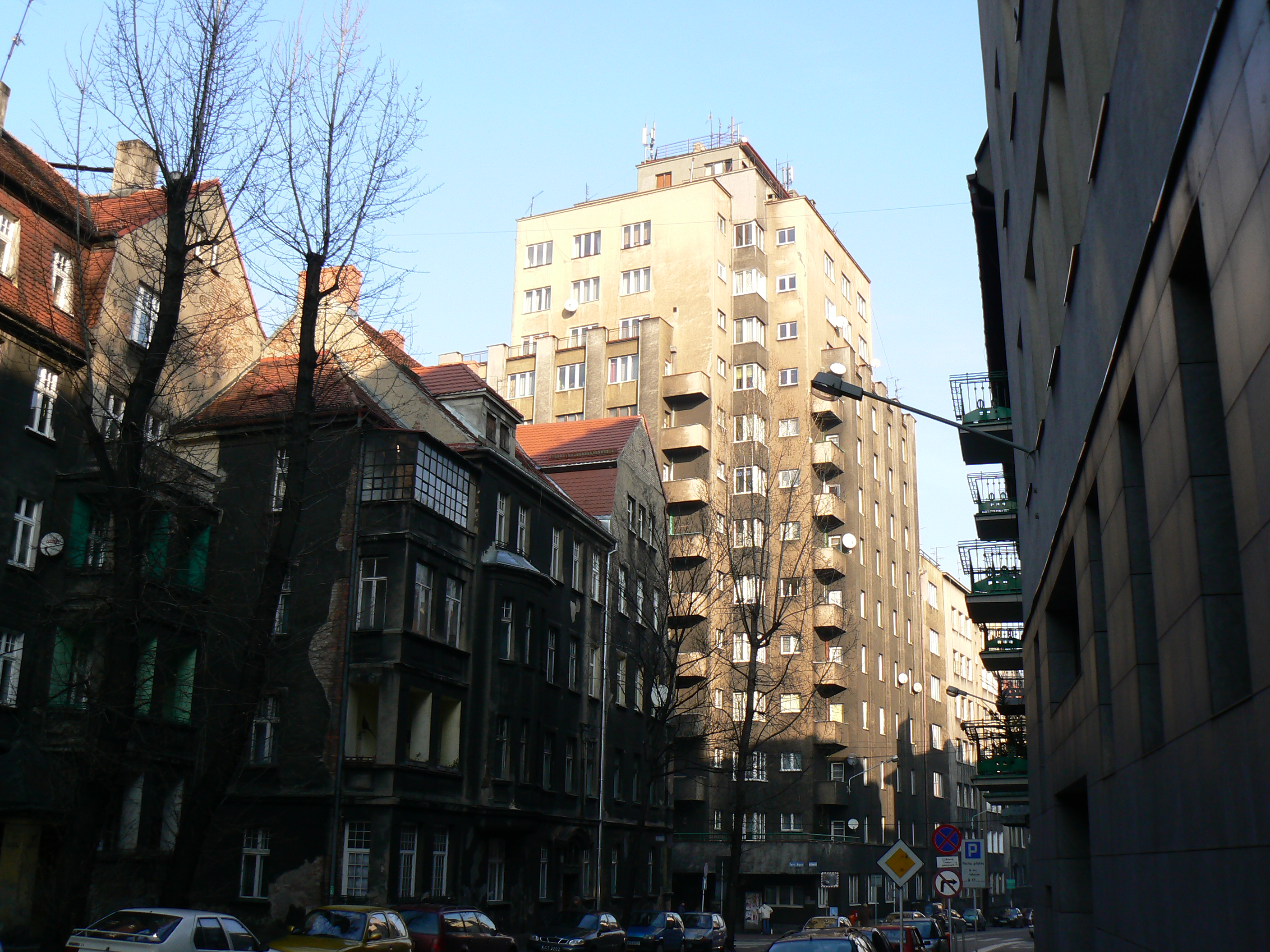 Katowice, ul. Skłodowskiej-Curie i Drapacz Chmur. Po lewej kamienica, w której mieszkali Dworniokowie z serialu "Święta wojna" (1999–2008).